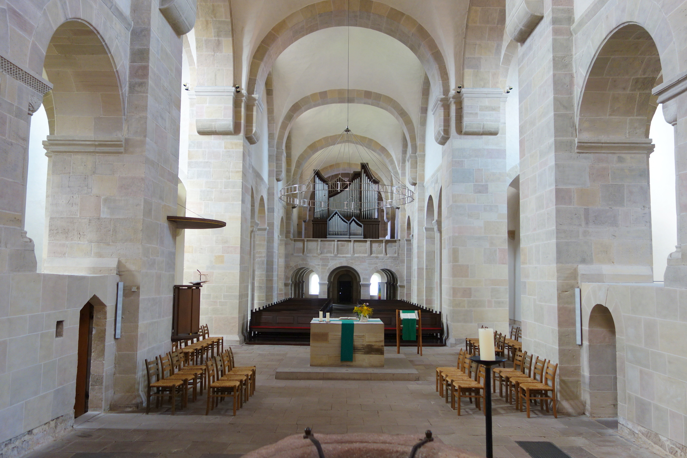 Orgel in Lippoldsberg, Hessen, Deutschland